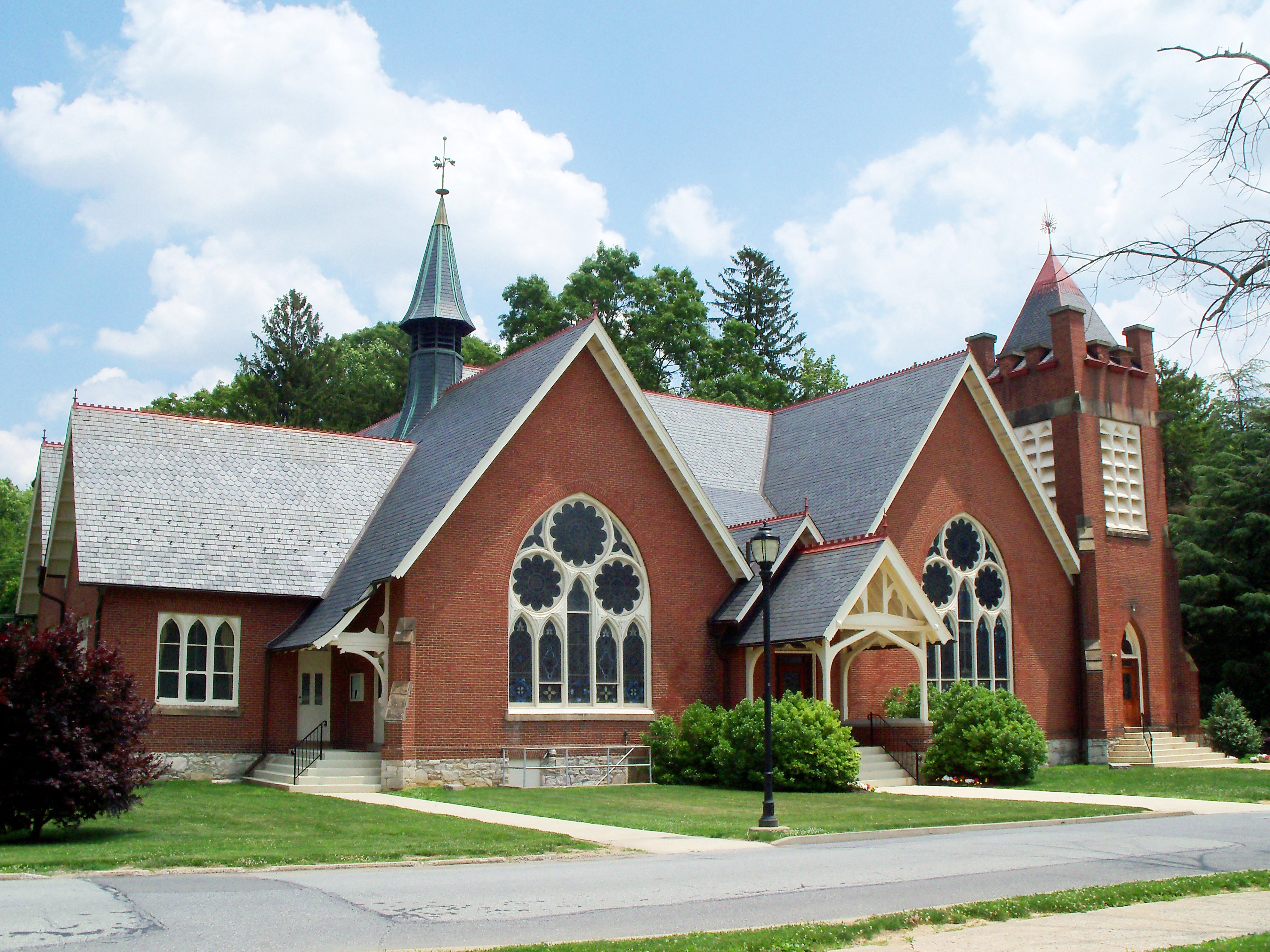 Chapel